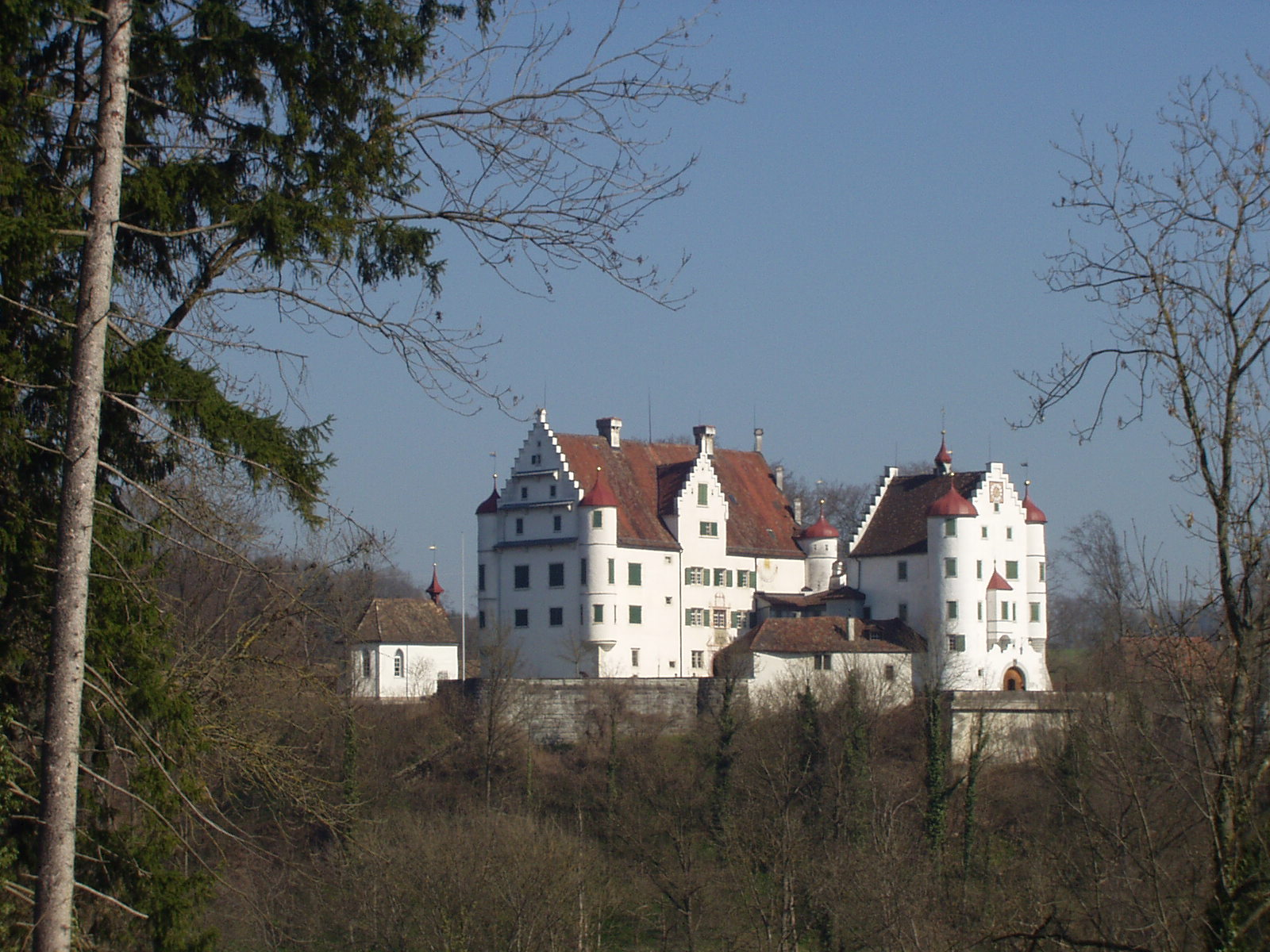 Schloss Altenklingen bei Maerstetten TG